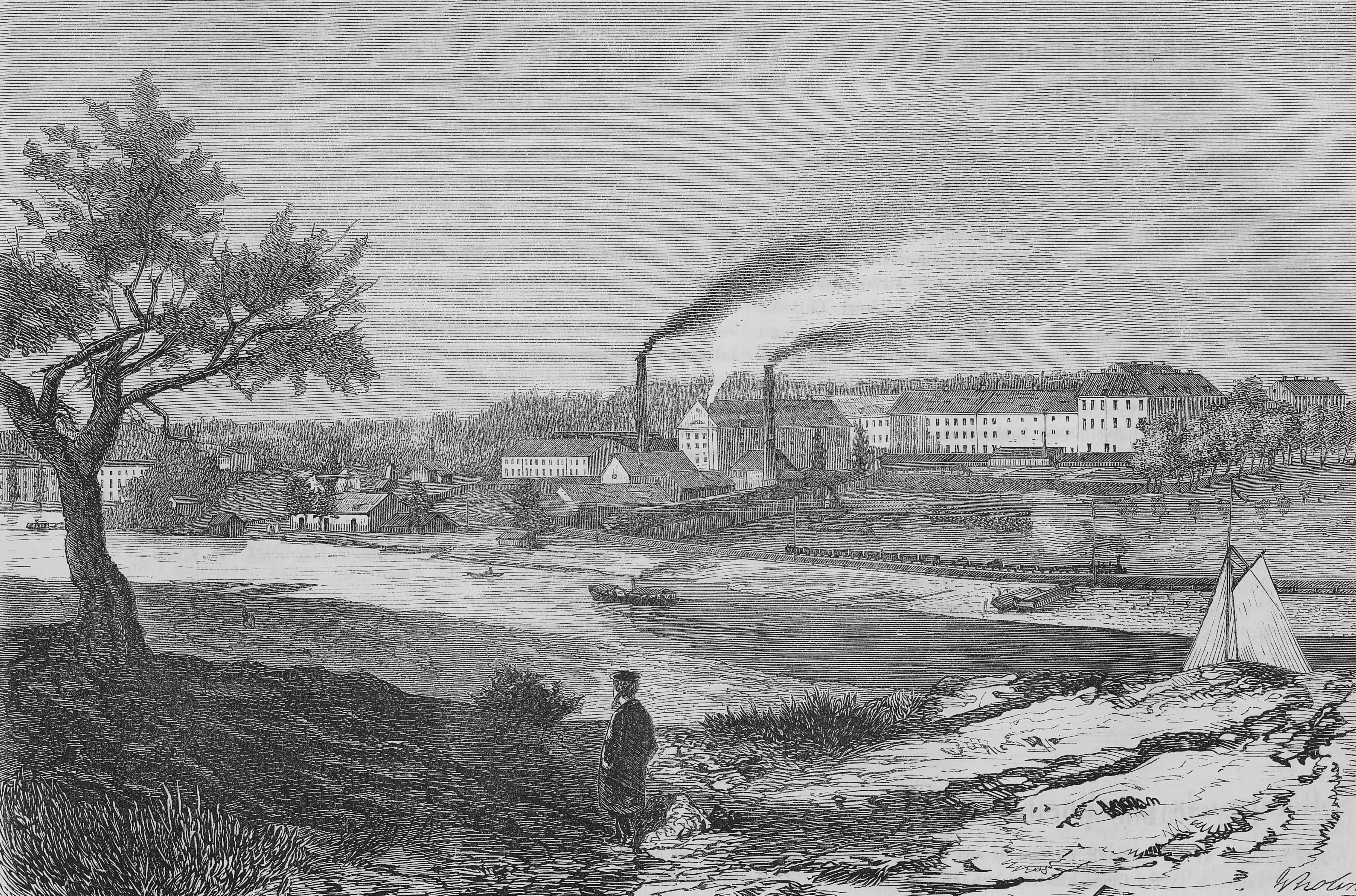 Illustrasjon hentet fra boken Nordiska taflor av ukjent forfatter og utgitt av Albert Bonnier (se, 1870)